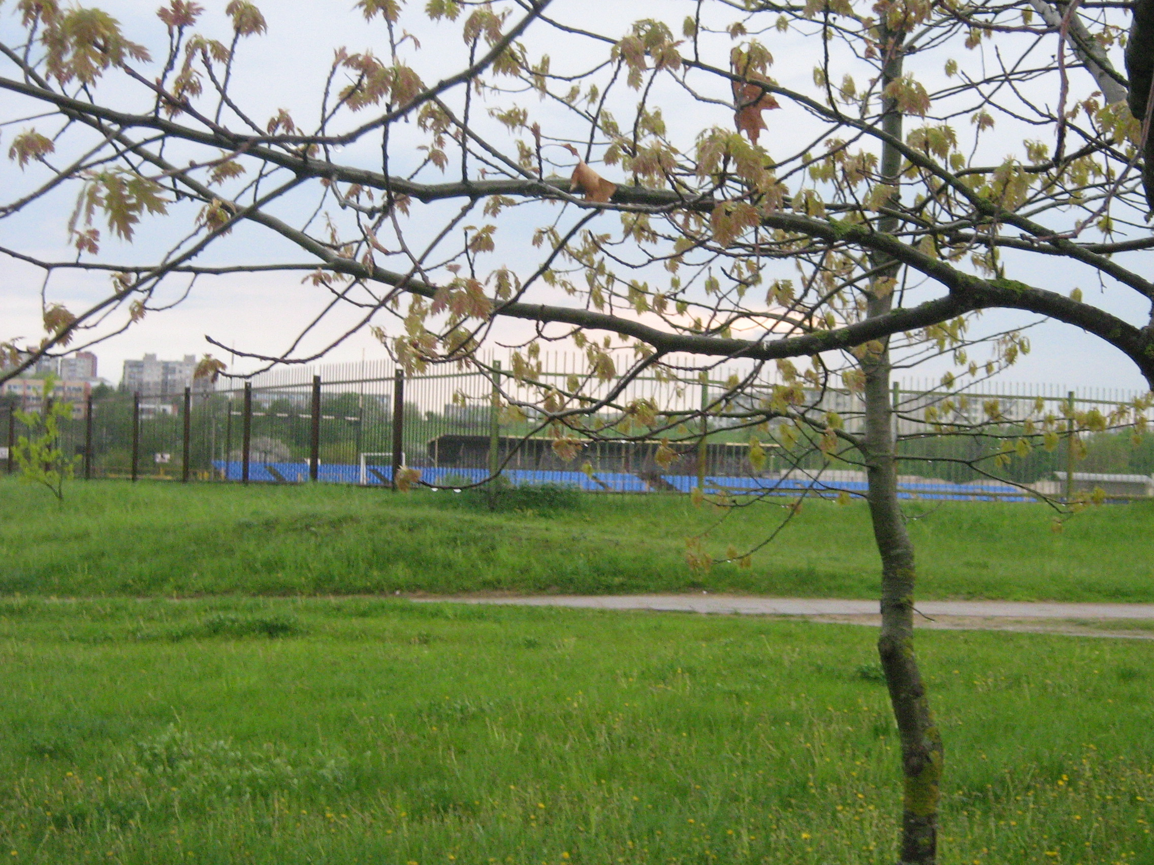 Jonavos stadiono fragmentas